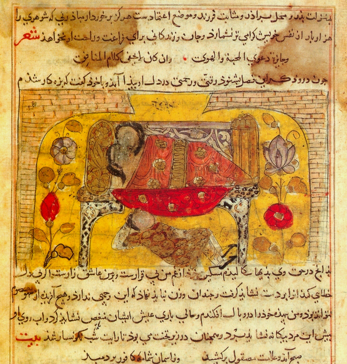 Плотник Сарандиб, его неверная жена и её любовник. «Калила и Димна» Наср Аллаха. Шираз. 1333 г. Британский музей, Лондон The foolish "carpenter of Sarandib", under the bed on which lie his wife and her lover. She notices his foot and contrives a story to prove her innocence. [1]